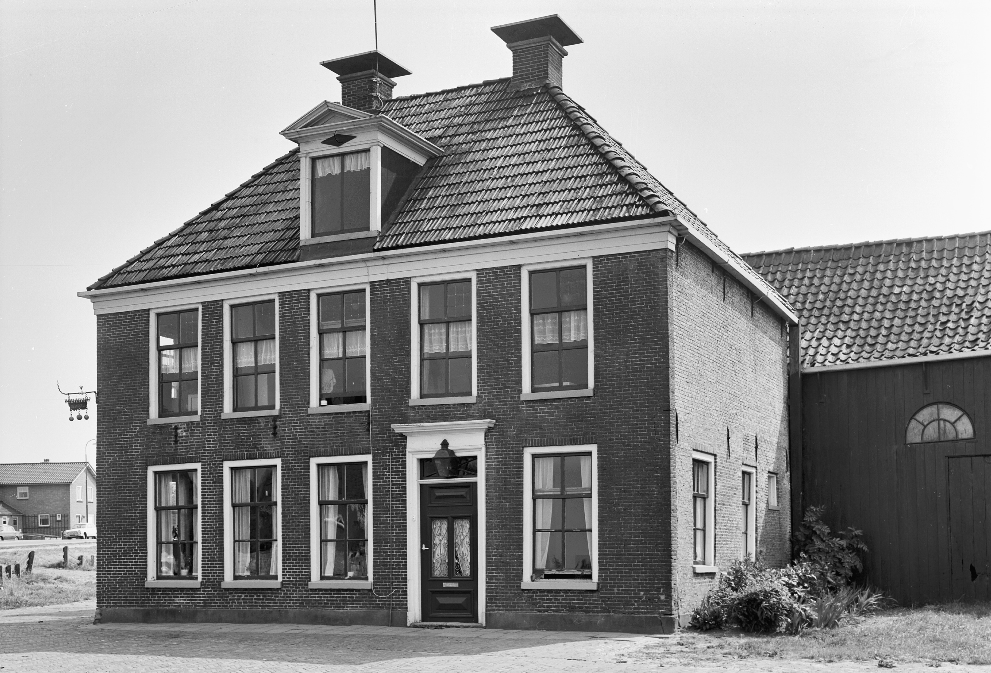 aanzicht